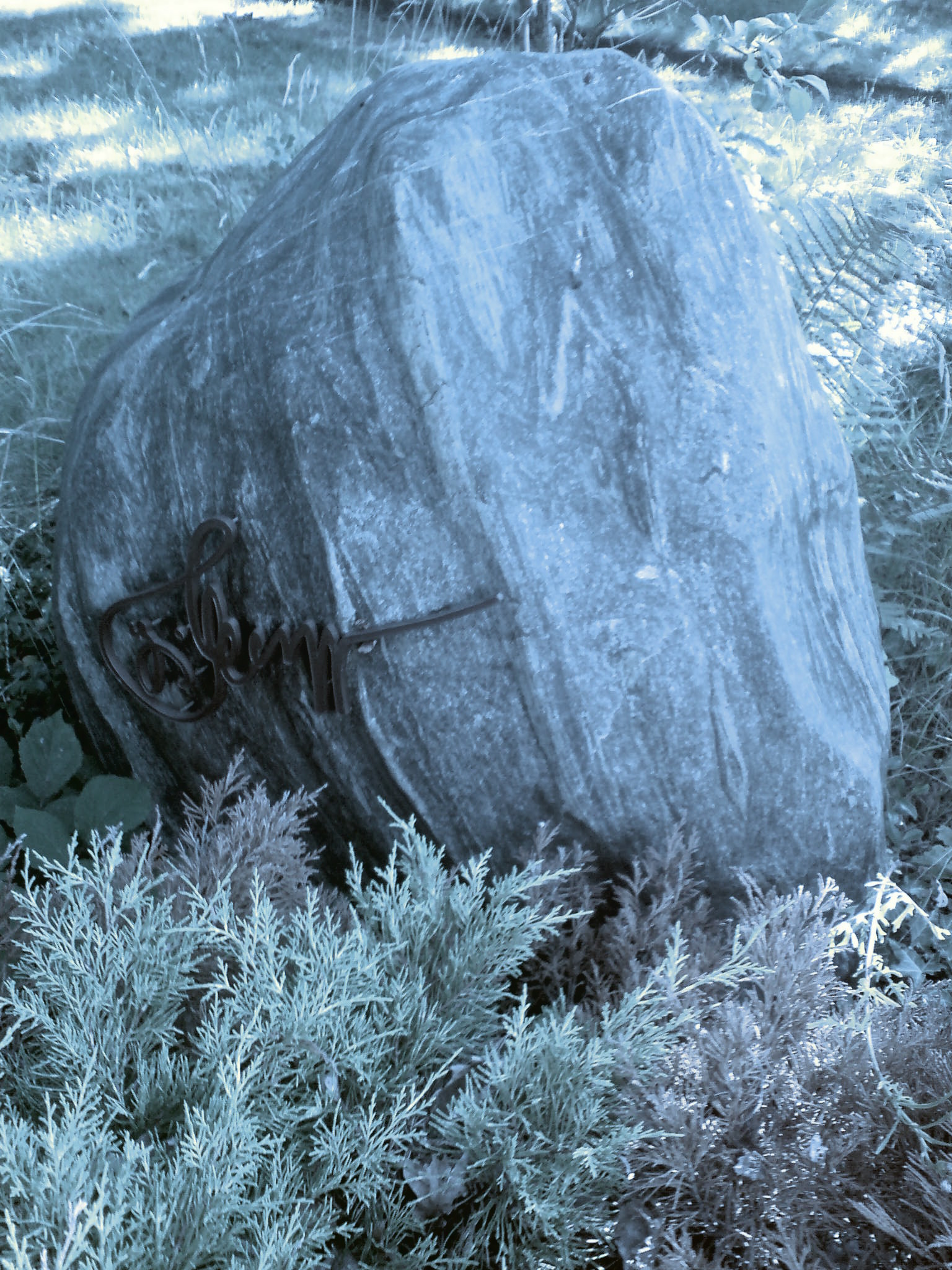 Der Grabstein des Heinz Helfgen